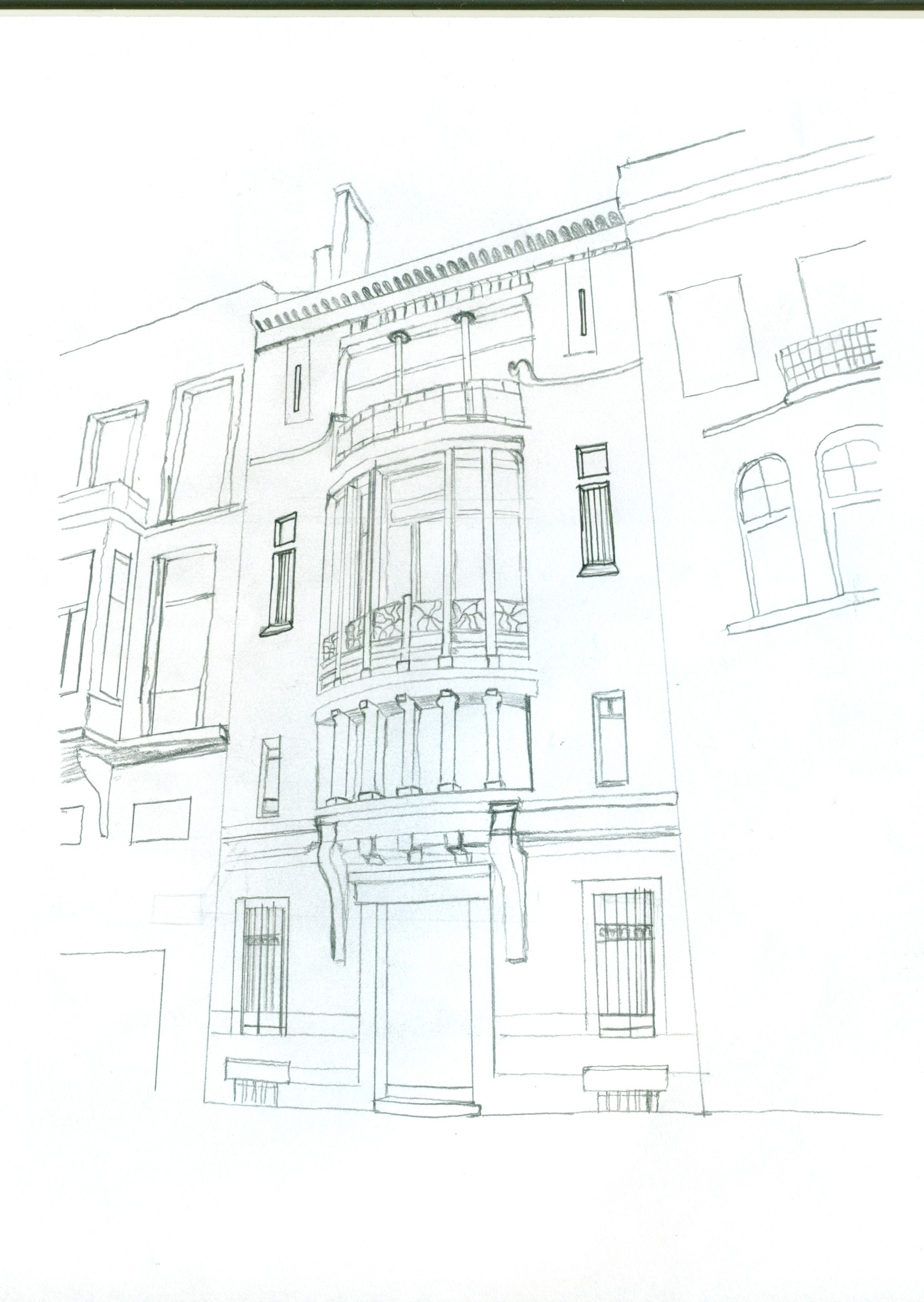 Croquis Fachada "Hôtel Tassel" de Victor Horta